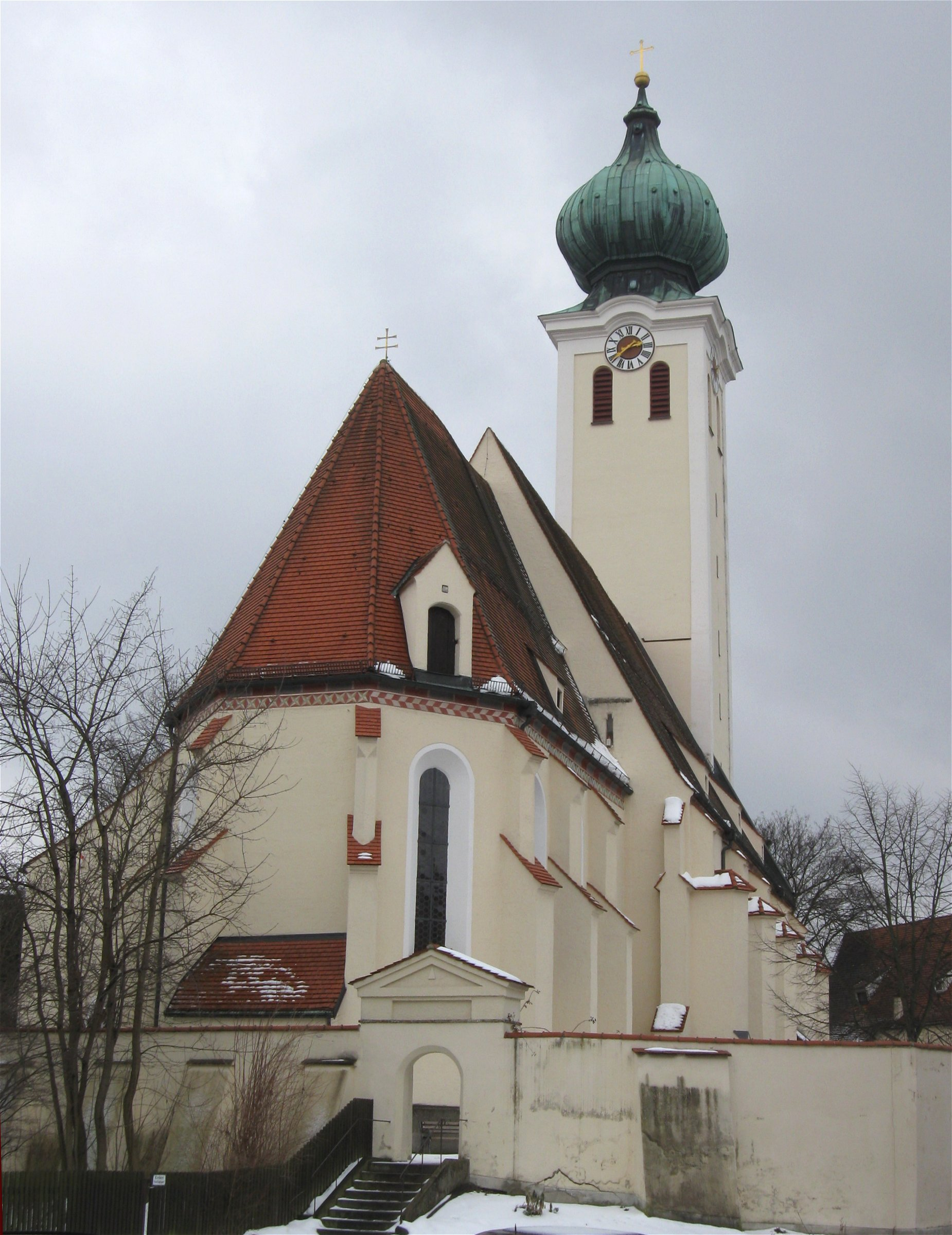 Aribonenstraße 9; Kath. Pfarrkirche St. Maria, Wallfahrtskirche des 15. Jh., Wandpfeilerkirche mit eingezogenem Chor, 1675 barockisiert, gotischer Turm mit barockem Helm